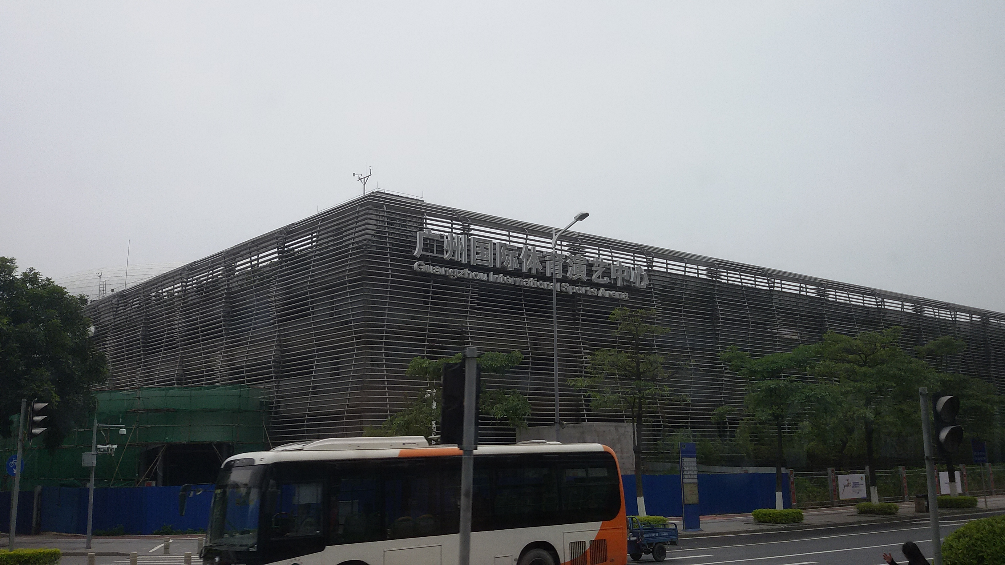 粵語: 廣州國際體育演藝中心（東北門）